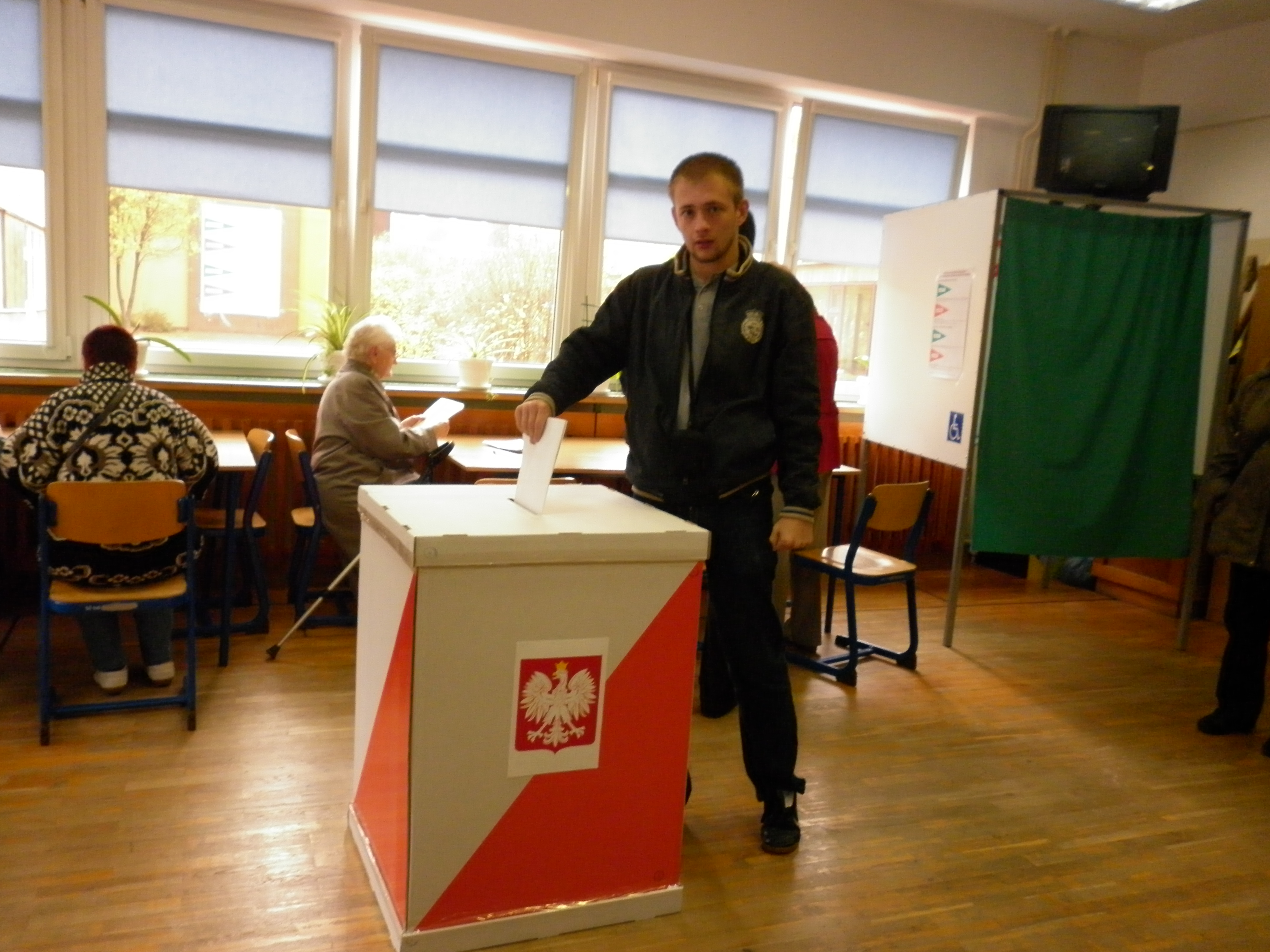 Głosowanie w wyborch parlamentarnych 2011